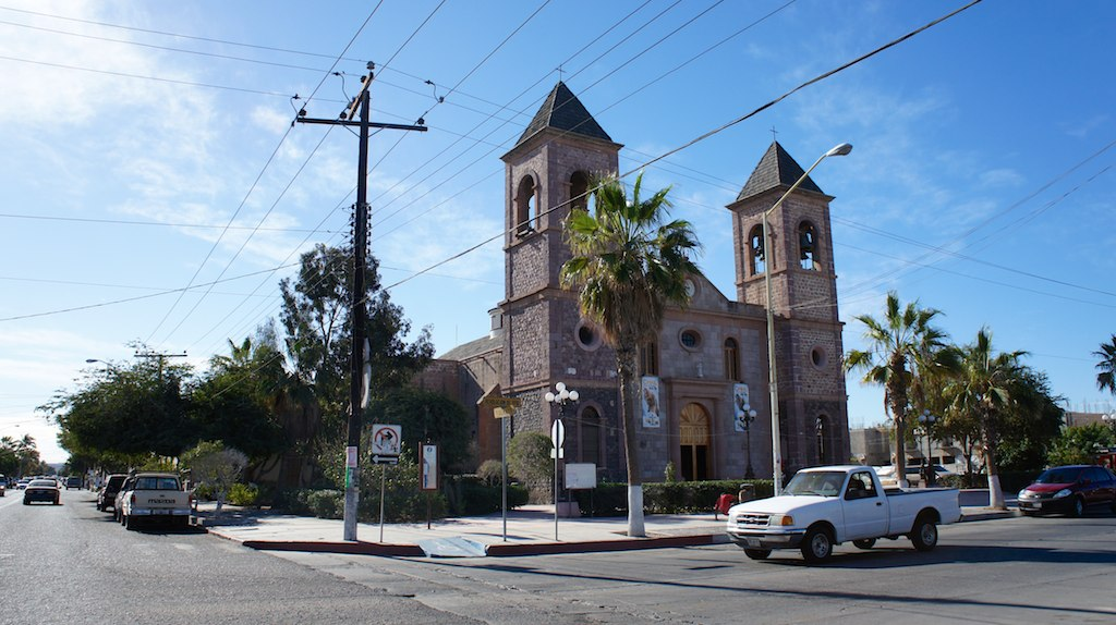 La Paz, Baja California Sur, México.